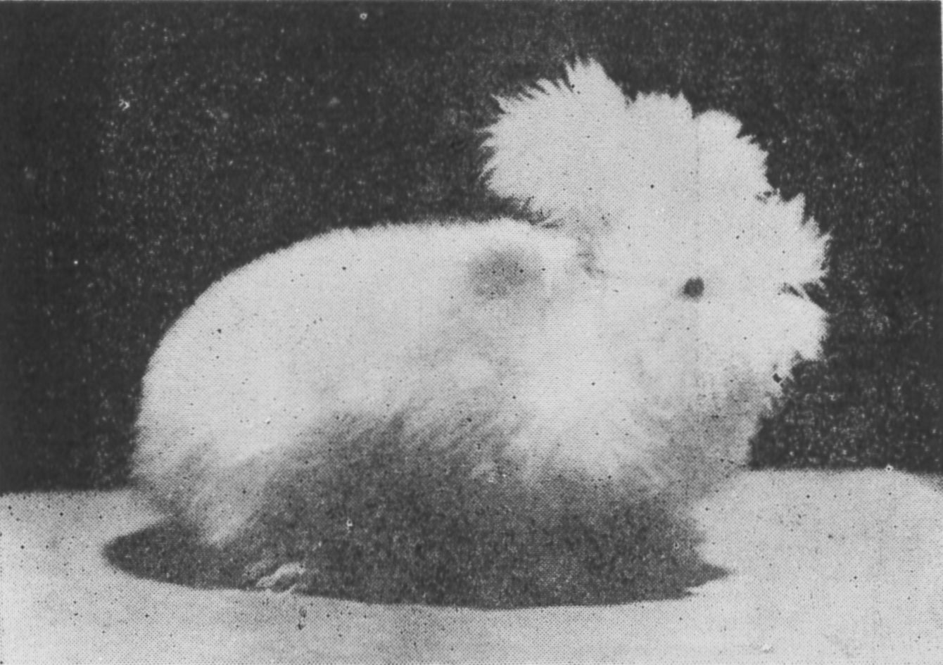 日本種。日本国内で飼育されていたアンゴラウサギ。イギリス系とカナダ系の交配種